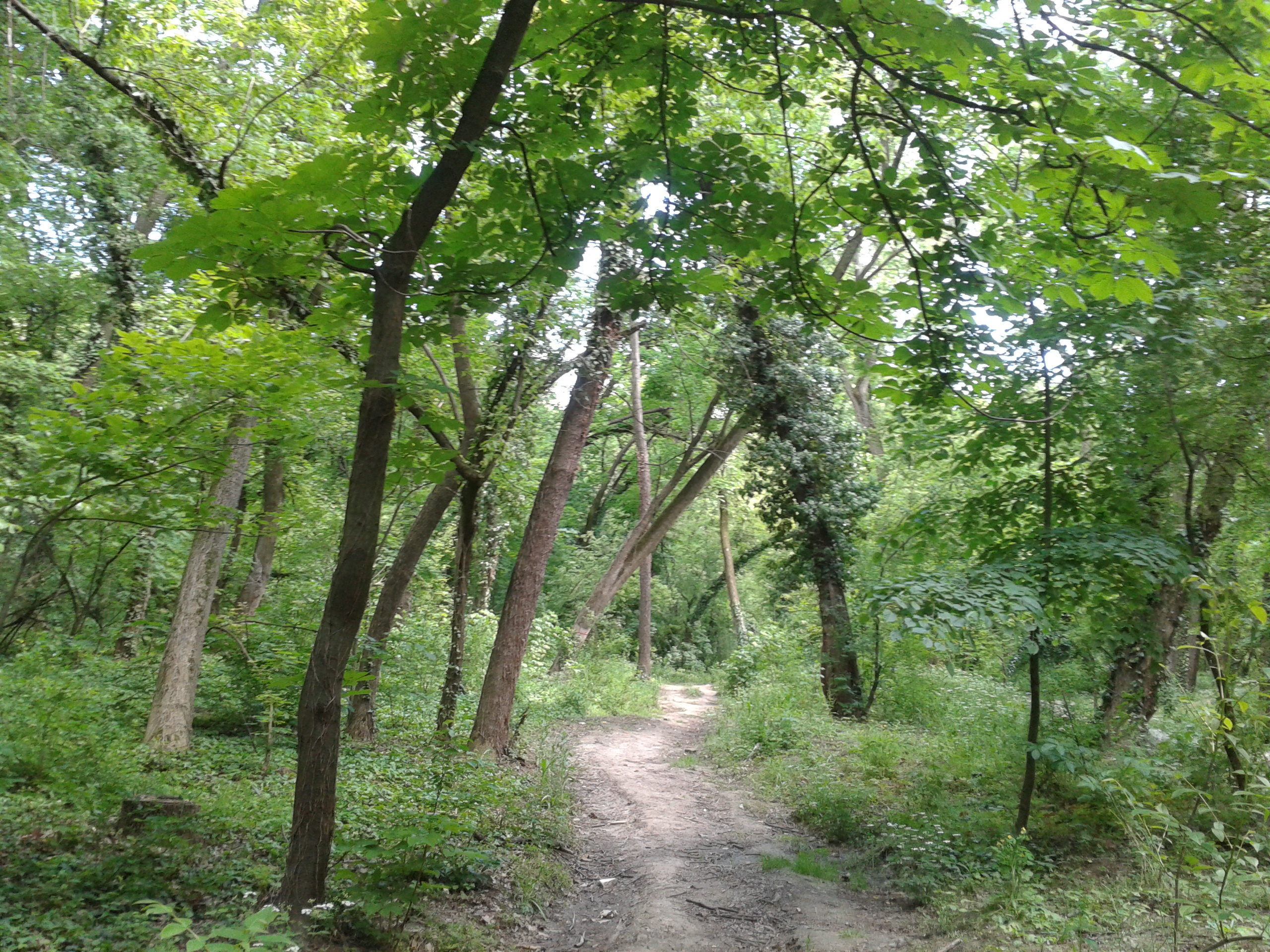 Српски (ћирилица): Ово је фотографија заштићеног природног добра у Србији под шифром: СП003 This is a a photo of a natural area in Serbia with ID: СП003